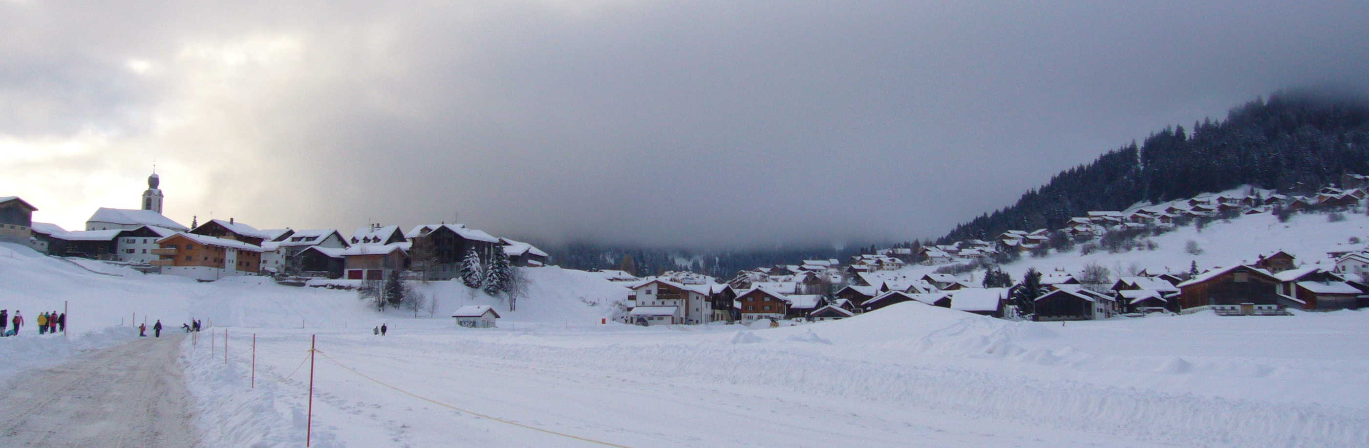 Brigels / Breil, Kanton Graubünden, Schweiz.